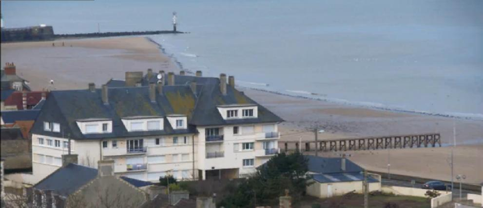 PLAGE DE GRANDCAMP 14450 ; PLAGE VUE DU CIEL